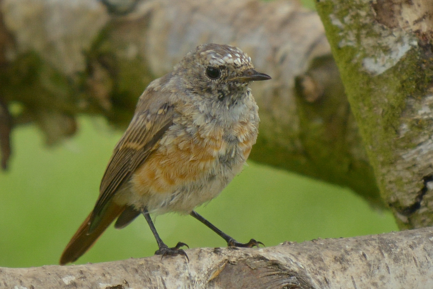 Juveniler Gartenrotschwanz im Jugendkleid, Illingen, Saarland/ Deutschland (2016).